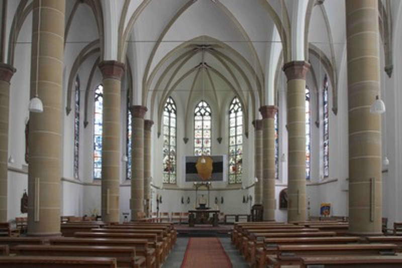 Innenraum der Kirche Sankt Joseph in Elberfeld